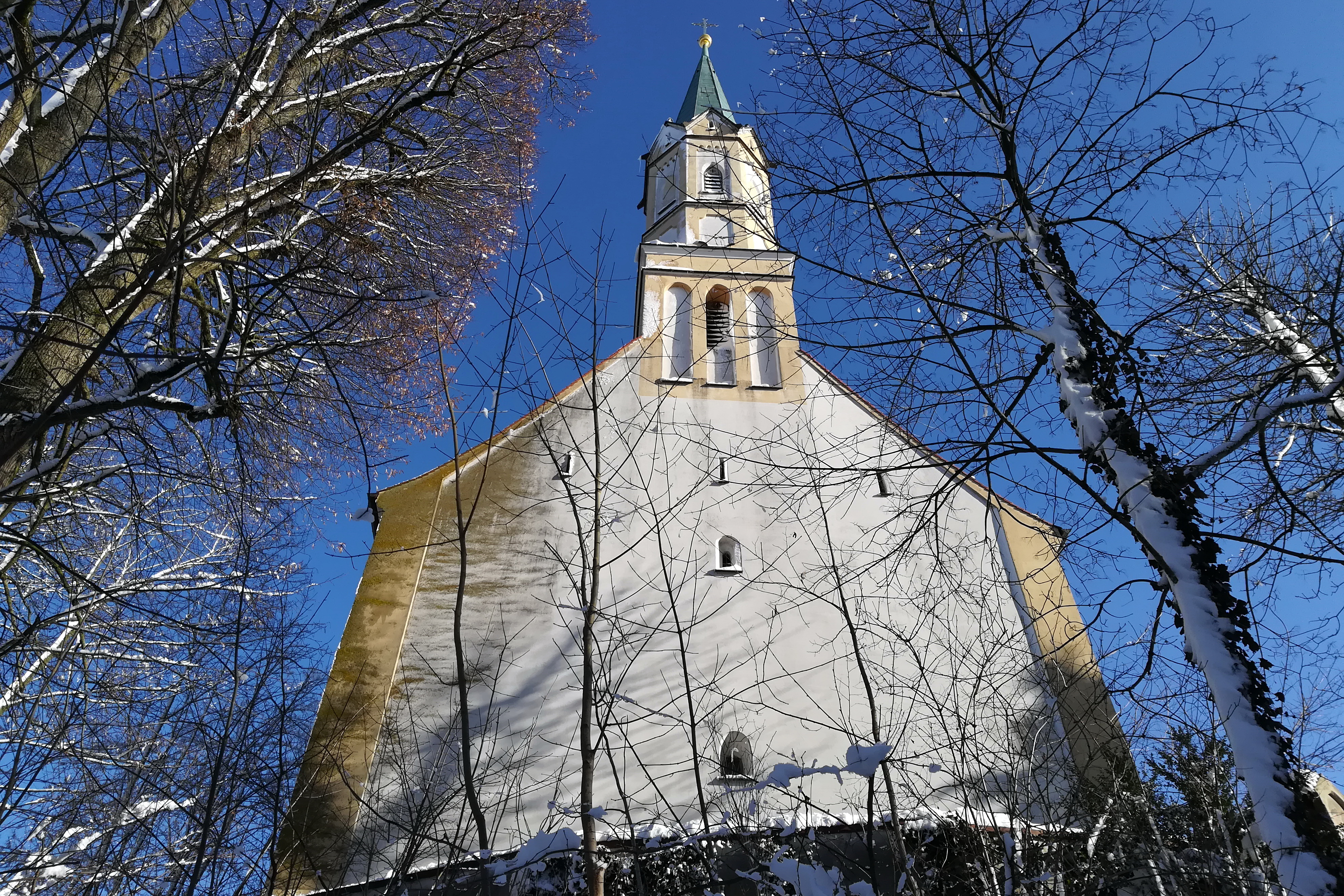 Katholische Kirche St. Peter und Paul (Salvatorkirche)ːSaalkirche mit Satteldach und dreiseitig geschlossenem Chor, 1723, auf älterer Grundlage, integrierter Westturm mit Spitzhelm, neugotisch, 1864; mit Ausstattung.